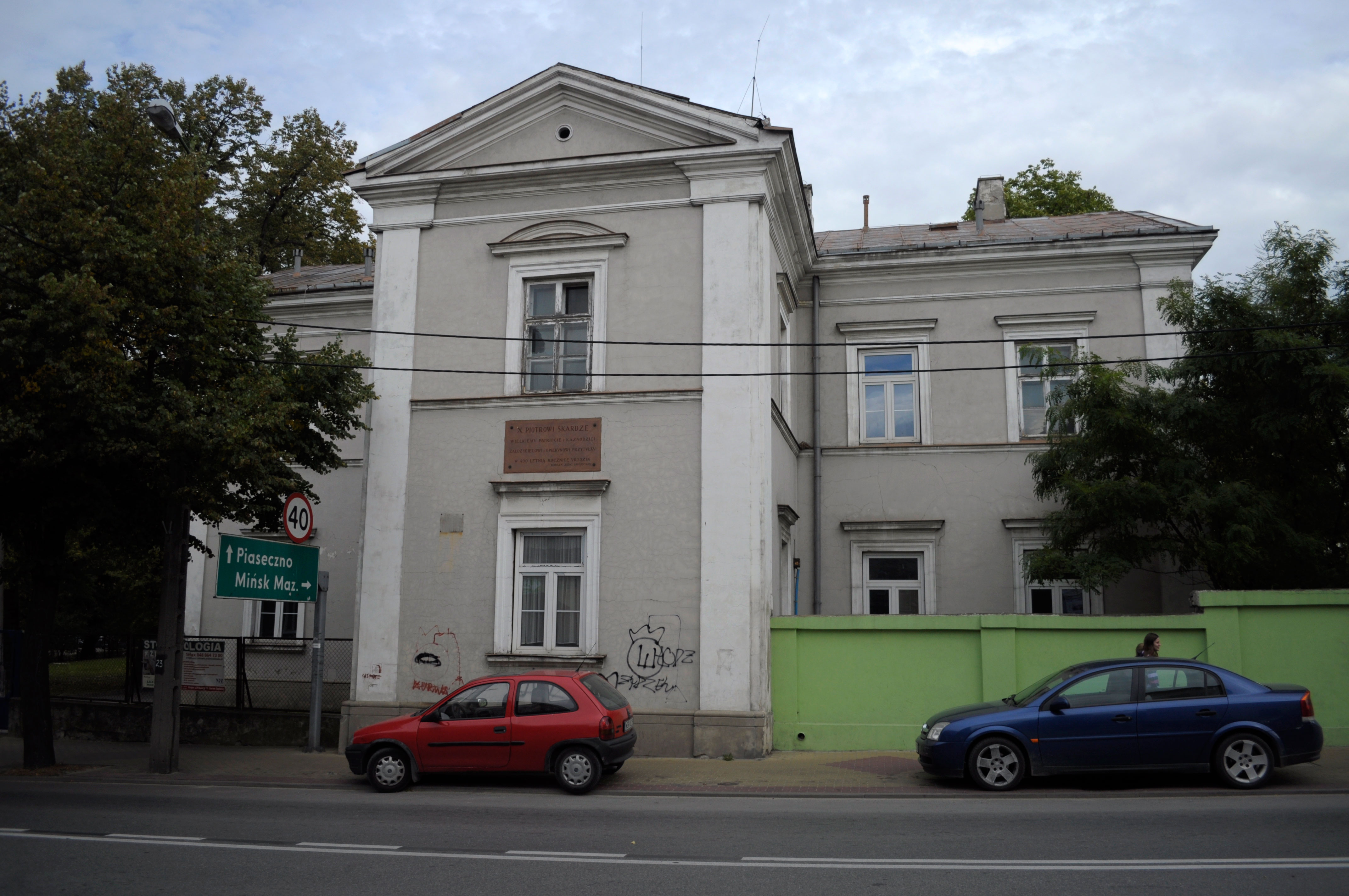 Budynek dawnego szpitala w Grójcu. Ul. Piotra Skargi.